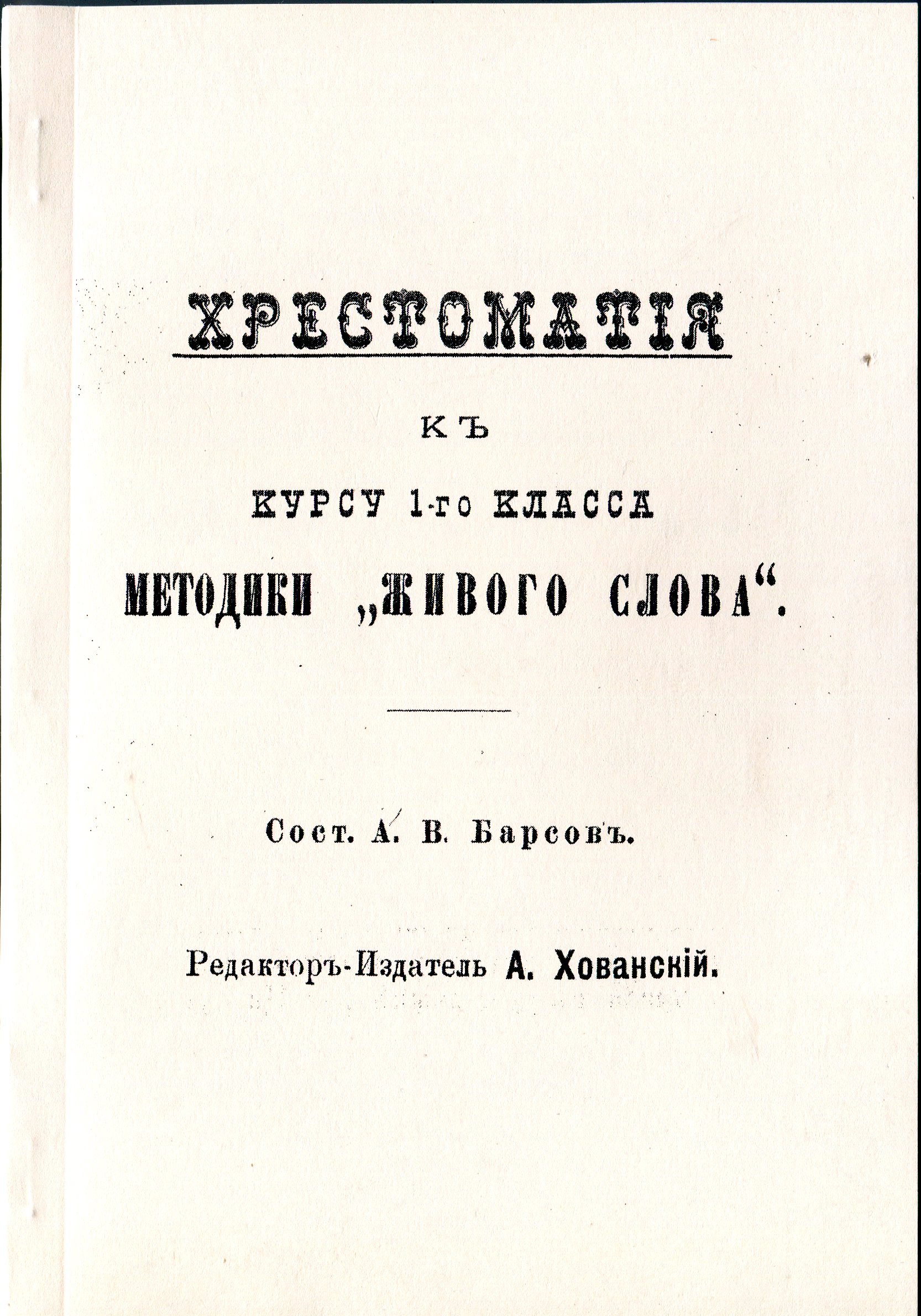 Хрестоматия к методике "Живого слова"